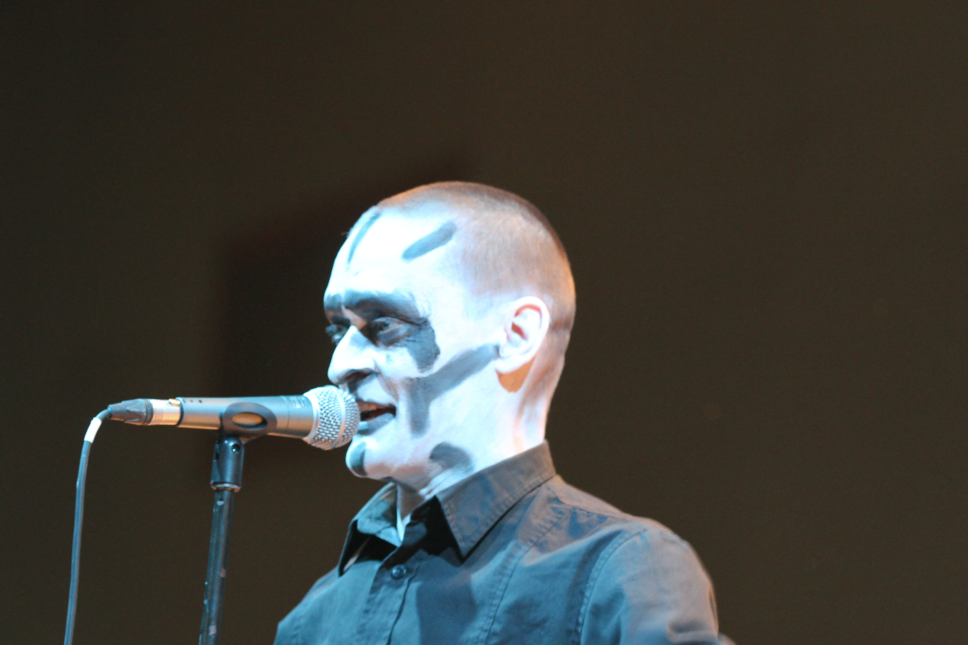 Stefan Ackermann von Das Ich auf dem Wave-Gotik-Treffen 2013 in der Agra-Halle.